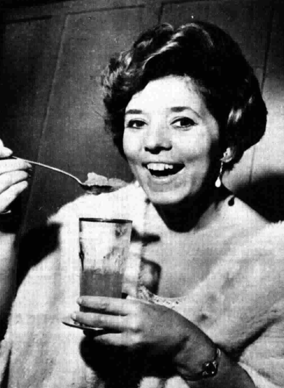 Italian singer Wilma De Angelis